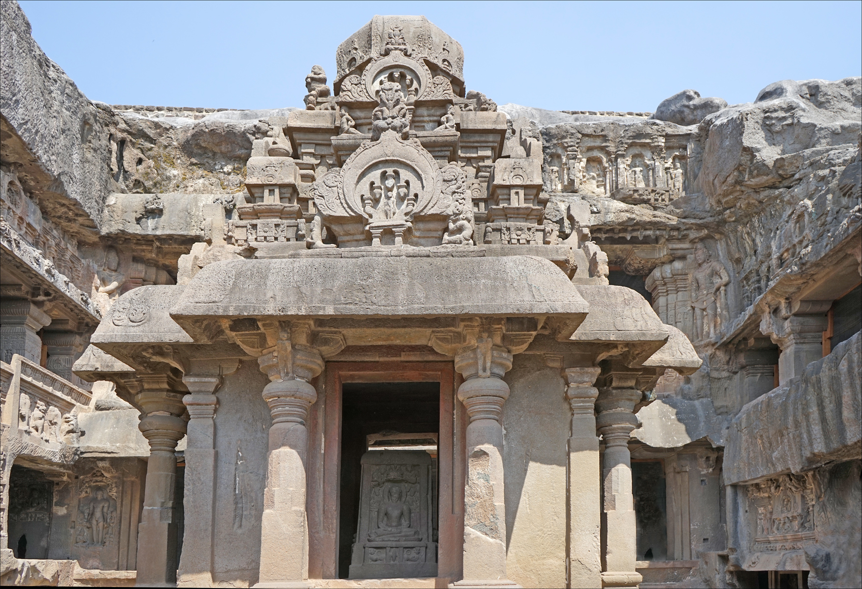 Ellora caves, Jainism